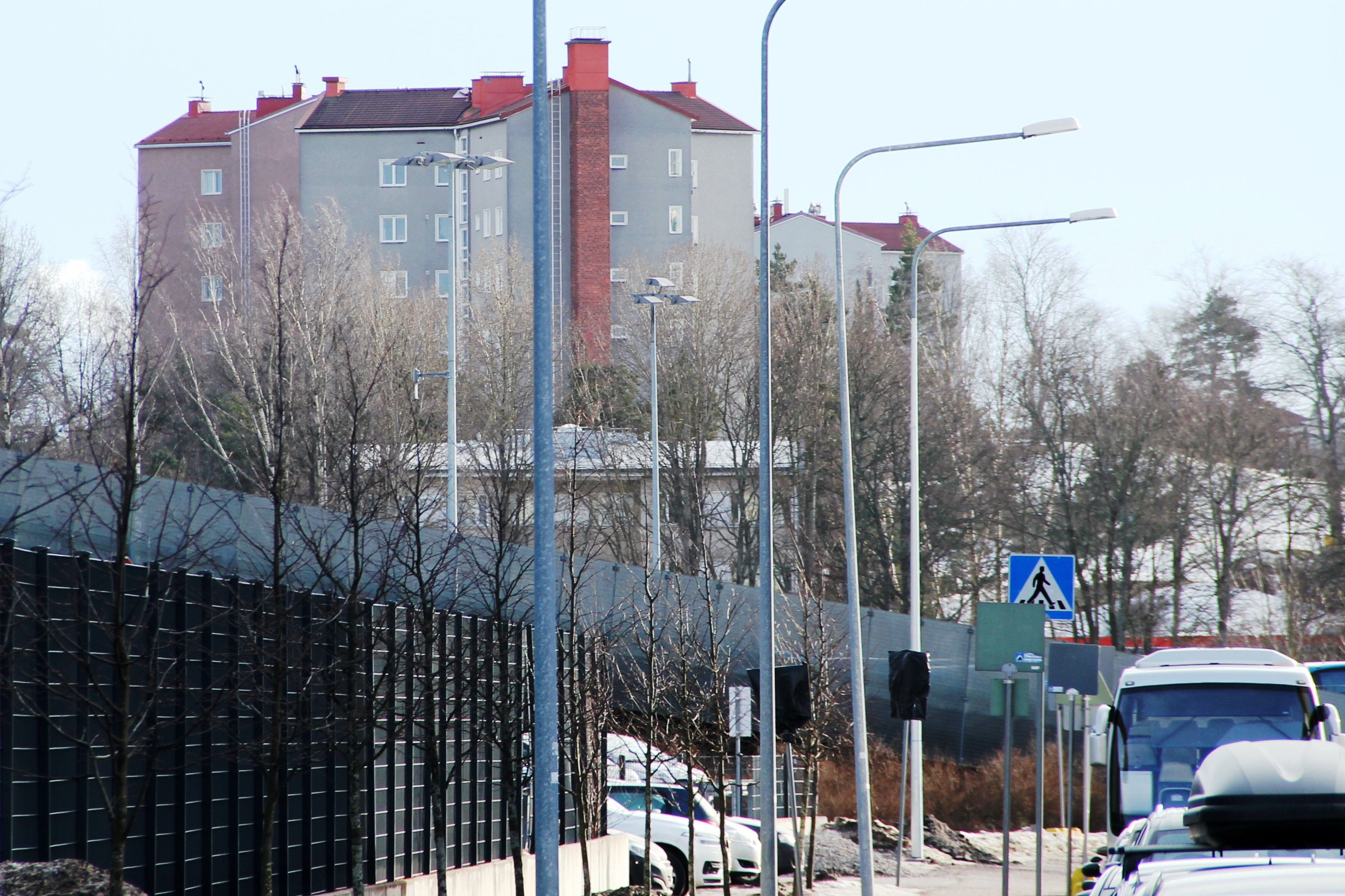 Ruskeasuo, Koroistentie, tornitalot, rakennettu 1950-luvun alkupuolella